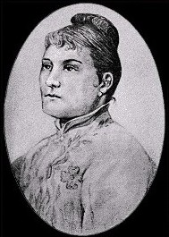 Portrait of María Josefa Báez Reverón.